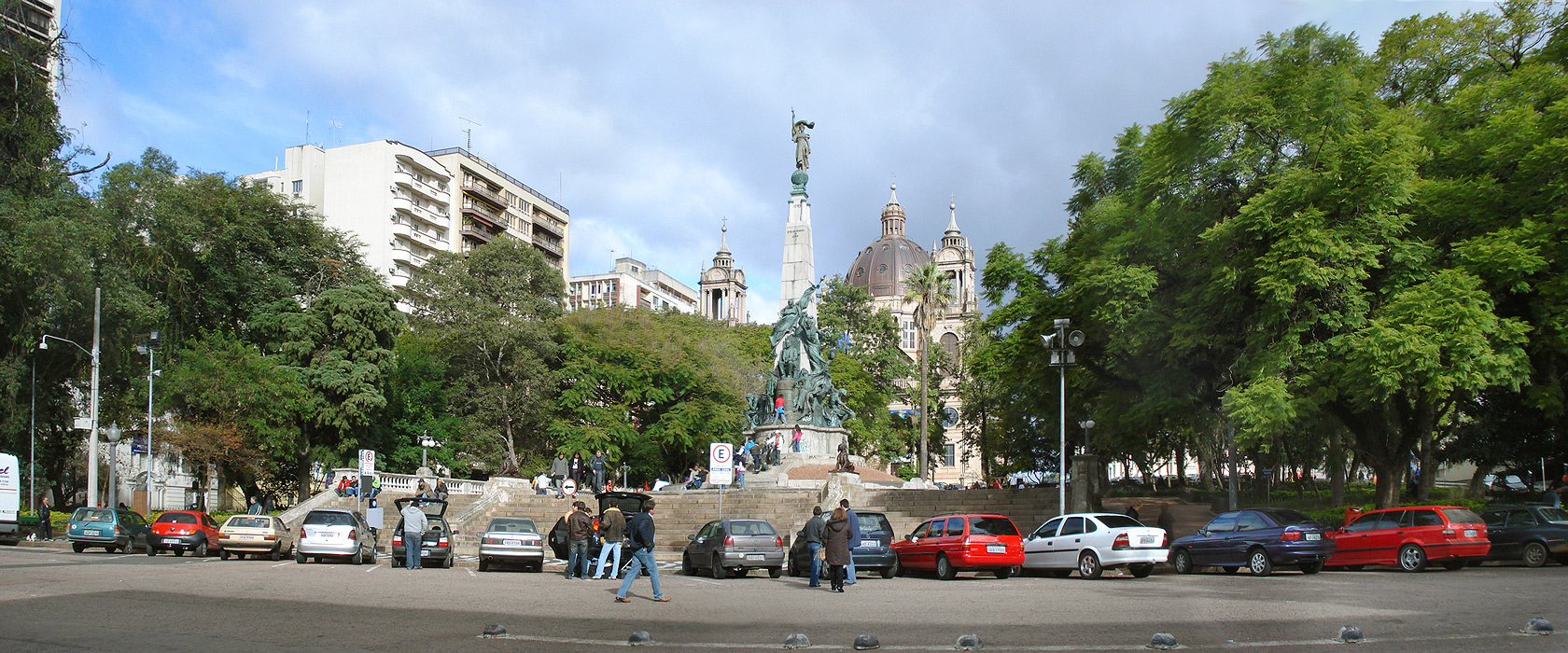 Praça da Matriz, Porto Alegre, Brasil